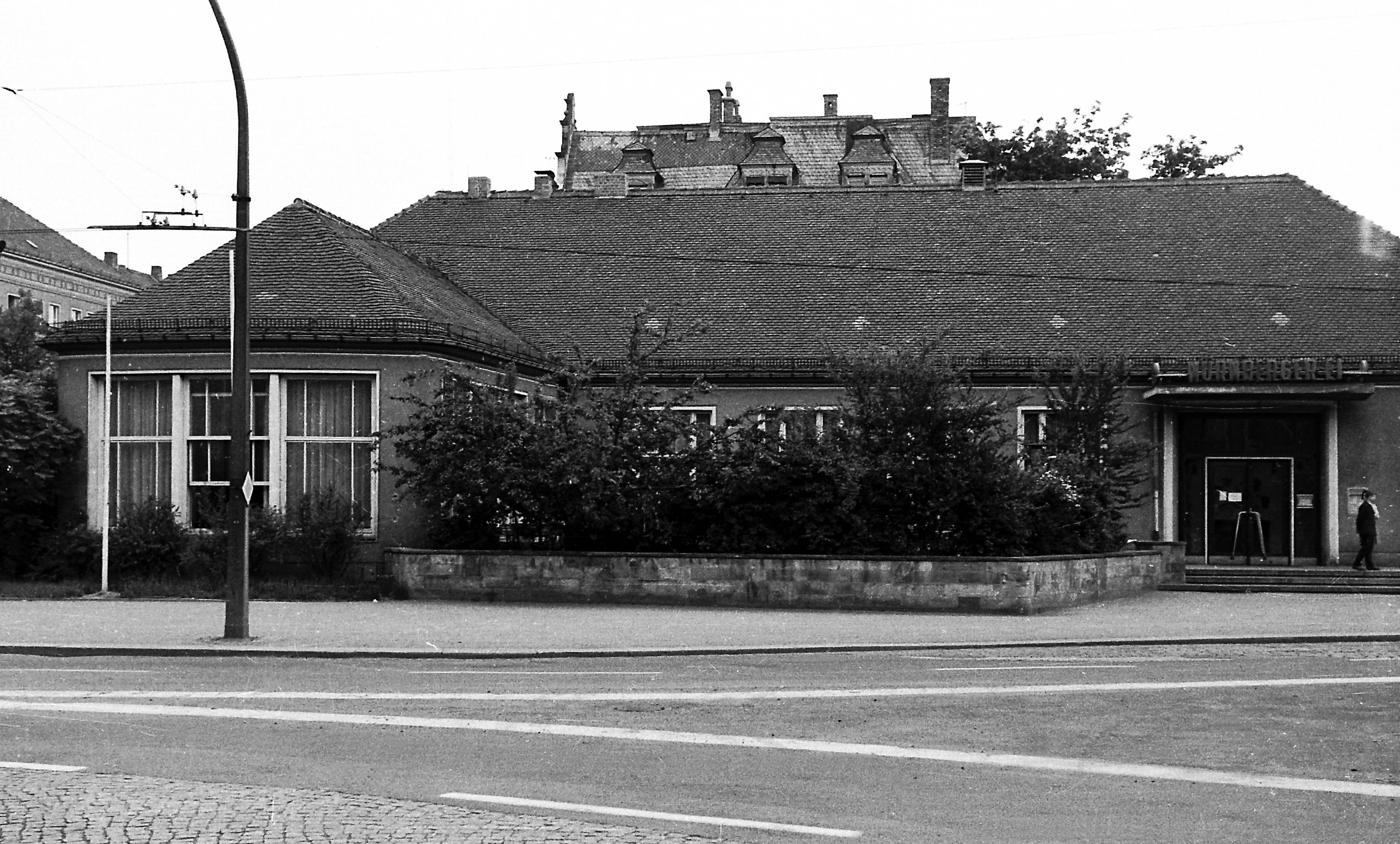 31.05.1968 8027 Dresden-Südvorstadt: Gaststätte "Nürnberger Ei", Nürnberger Str. 31a. Südseite zum Platz. 19680531100NR.JPG(c)Blobelt